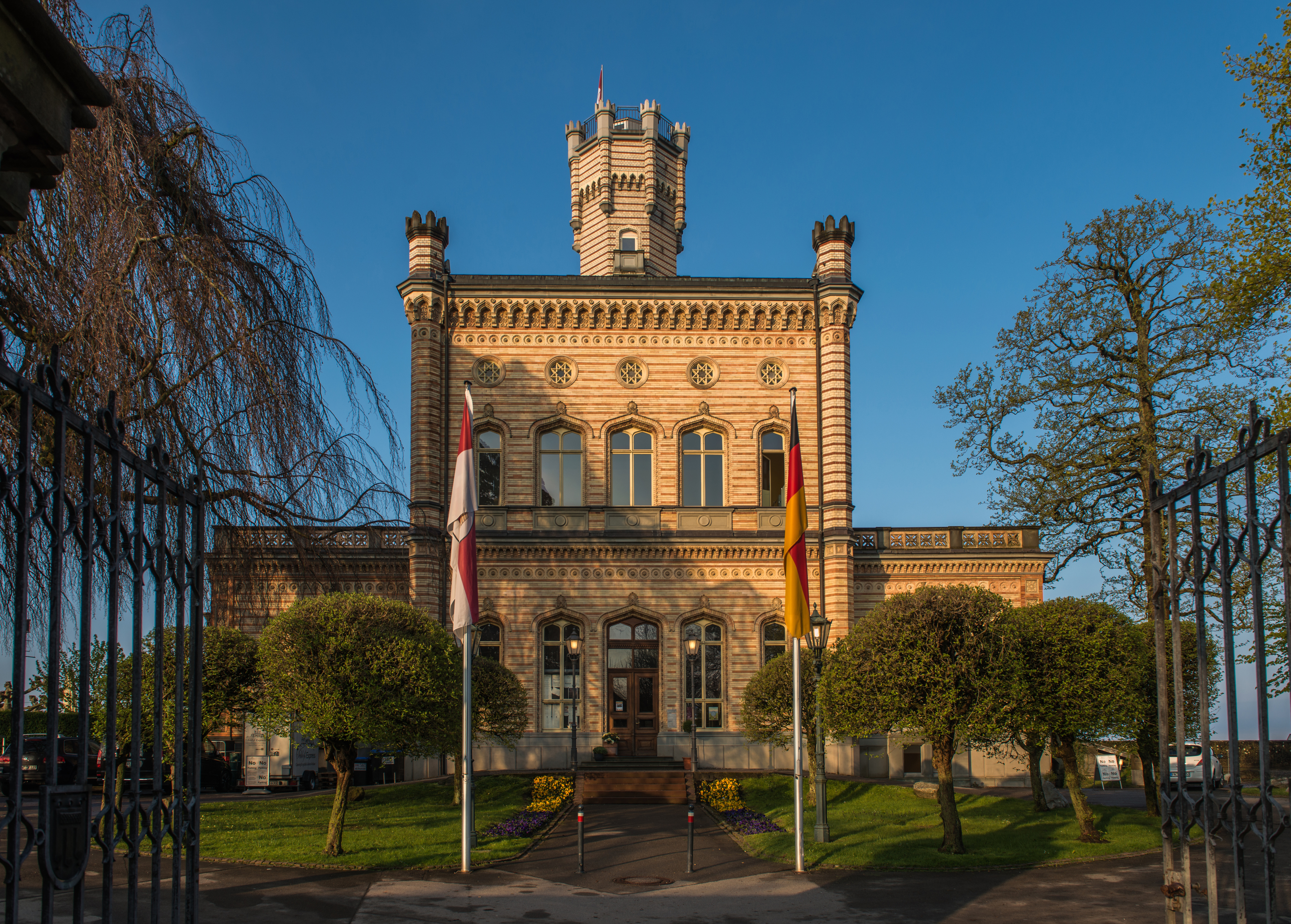 Das Schloss Montfort am Bodensee ist das Wahrzeichen der Gemeinde Langenargen. Einst unter dem Namen Villa Argena geplant, sollte es König Wilhelm I. von Württemberg als Lustschloss dienen. Es entstand auf einer Landzunge am Platz der Ruine der Burg Argen.